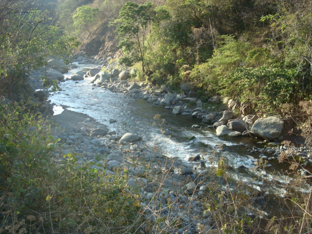 Río Grande de Candelaria, a su paso por Cangrejal de Acosta, Costa Rica.